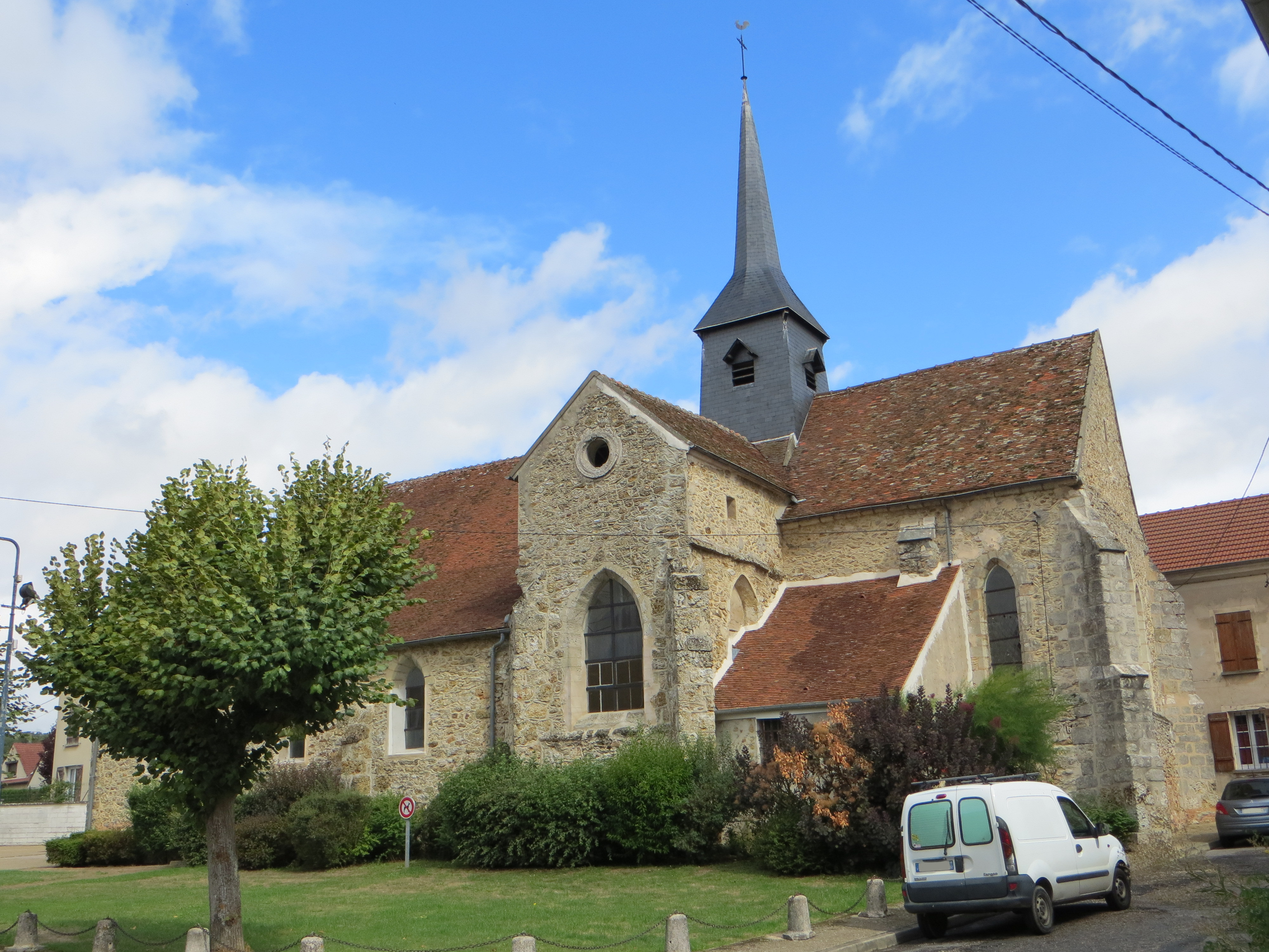 Vue de l'église